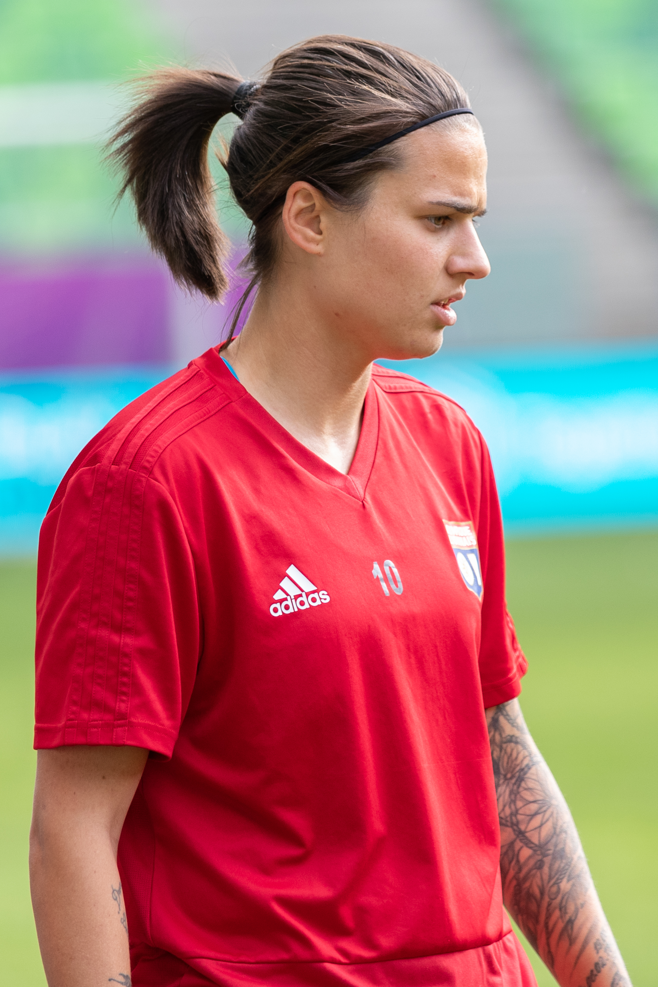 Fußball, Frauen, UEFA Women's Champions League, Olympique Lyonnais - FC Barcelona; Dzsenifer Marozsan (Olympique Lyon, 10); beim Abschlusstraining